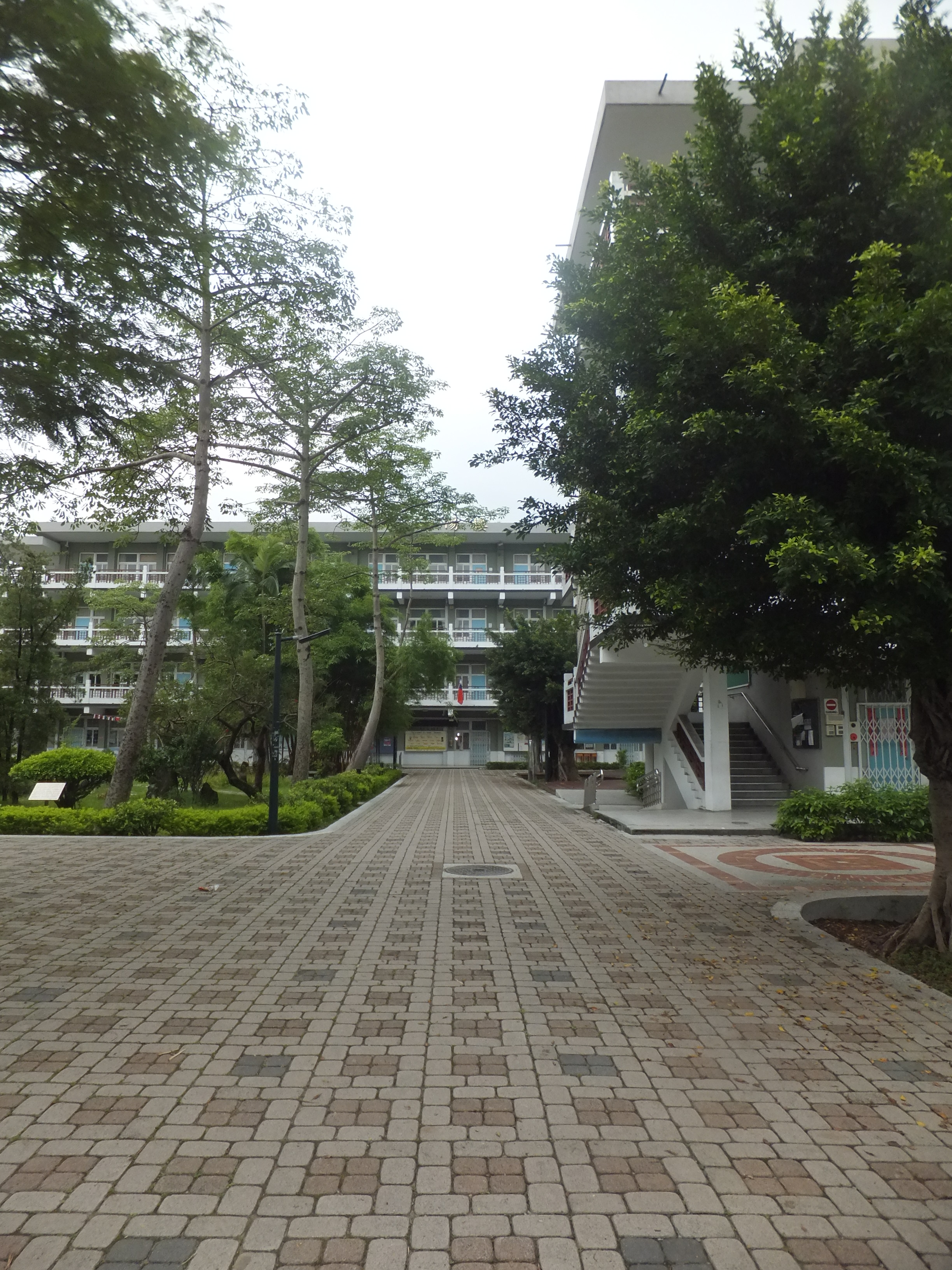 中文（台灣）: 陽明高中校園步道。